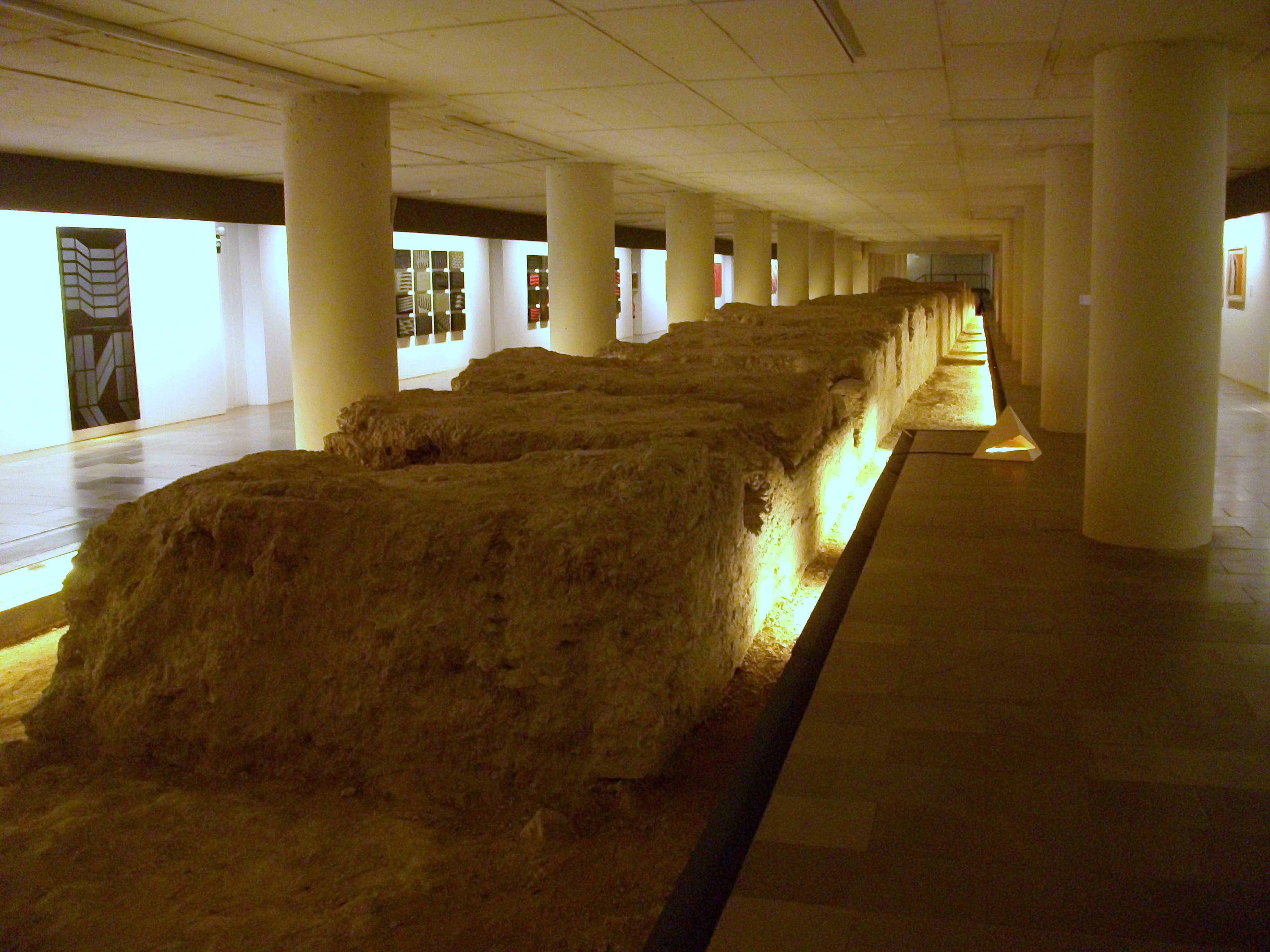 Sala de la Muralla de l'IVAM (Institut Valencià d'Art Modern).